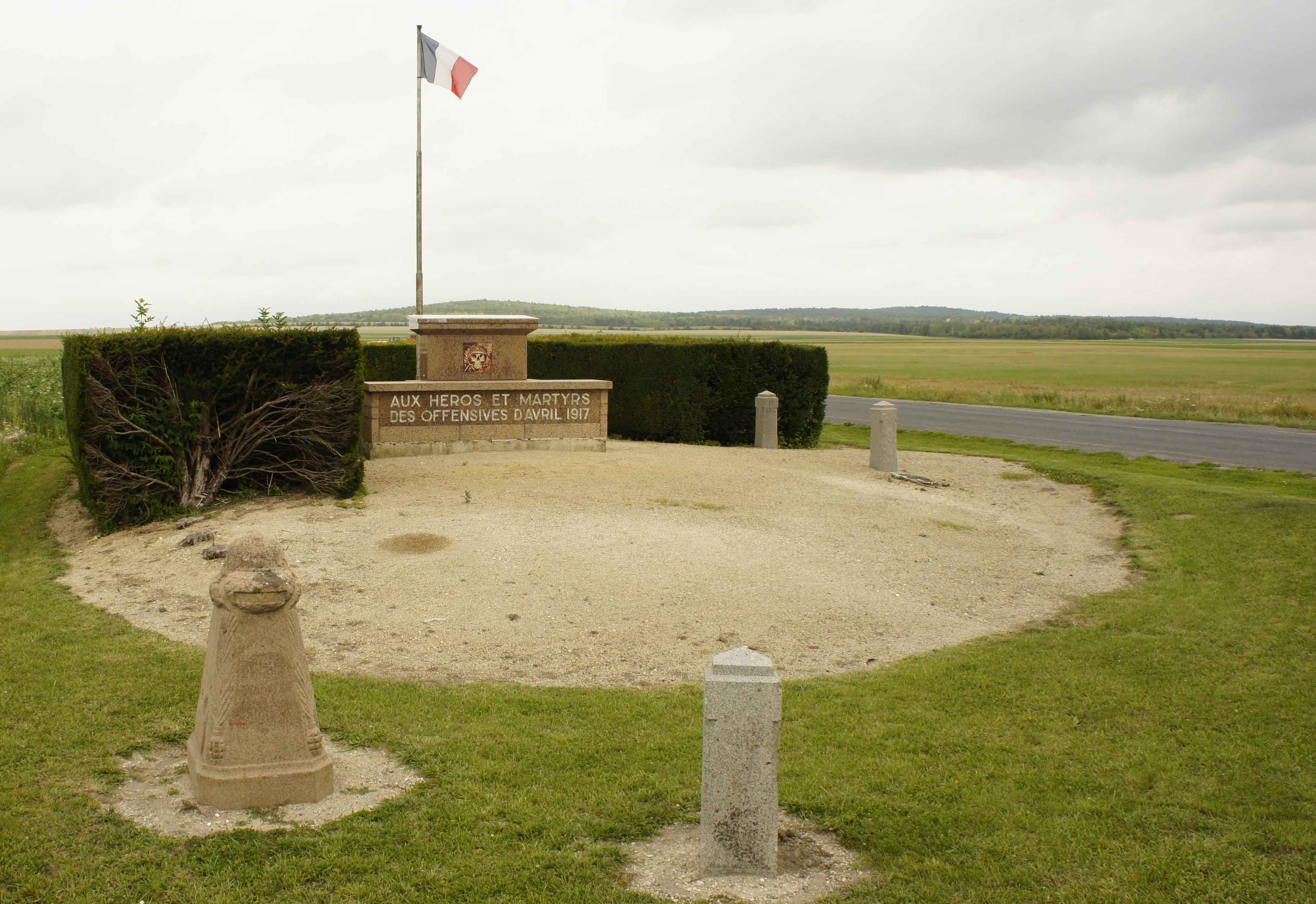 Monument à la VIIIe armée élevé en 1957, il est entouré de bornes en hommage aux régiments n° 85 RI, 95 RI, 27 RI, 1 RAC, 37 RAC; il se trouve sur la D931 voie de la Liberté entre Prosnes et Prunay.